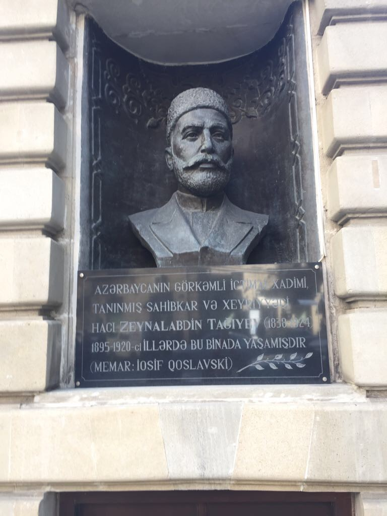 Бюст Гаджи Зейналабдину Тагиеву Закир Мехтиев совместно с Ибрагим Зейналов